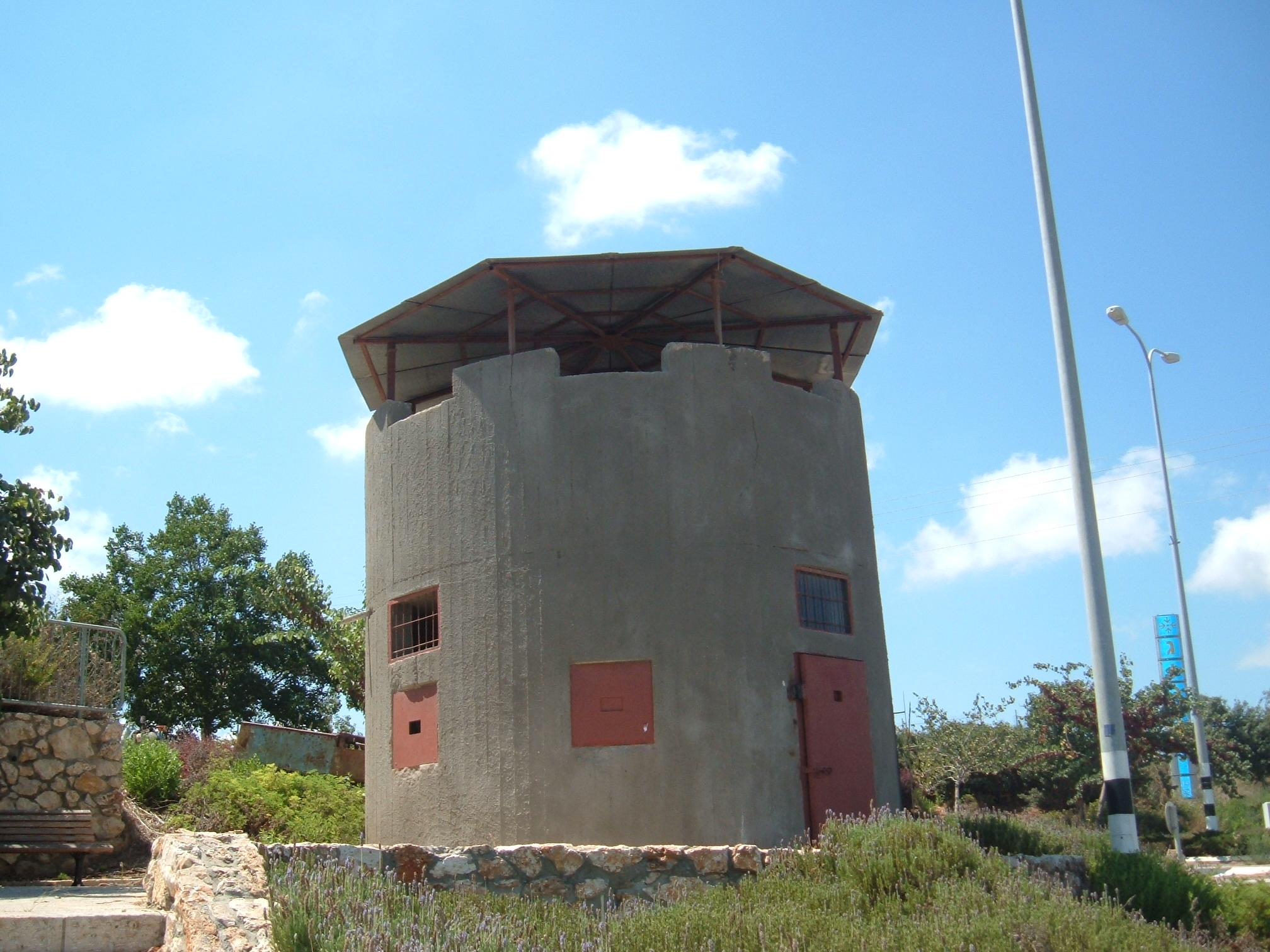 פילבוקס ליד אזור התעשייה גורן - Pill Box near Goren's industrial zone